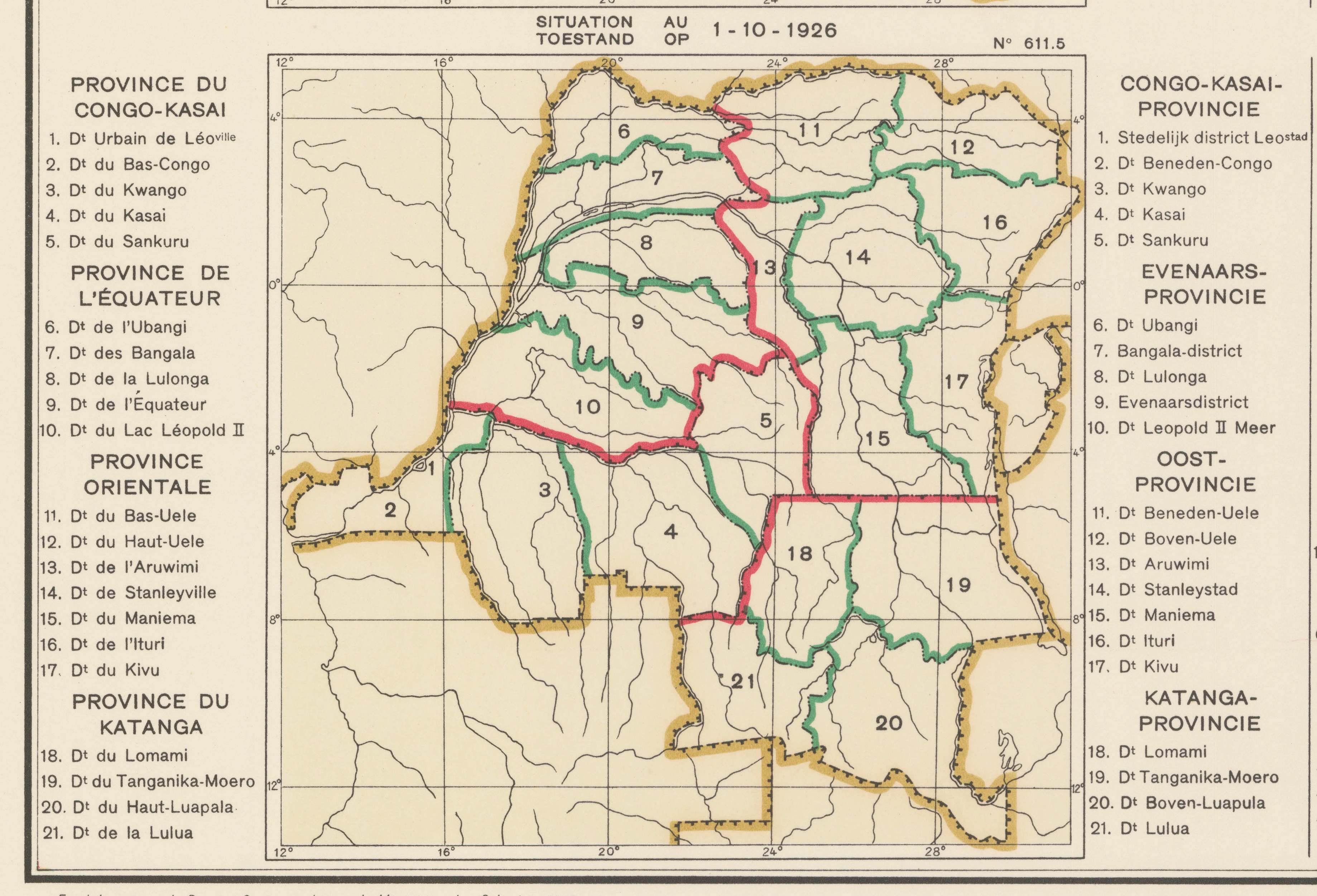 Carte des subdivisions administrative